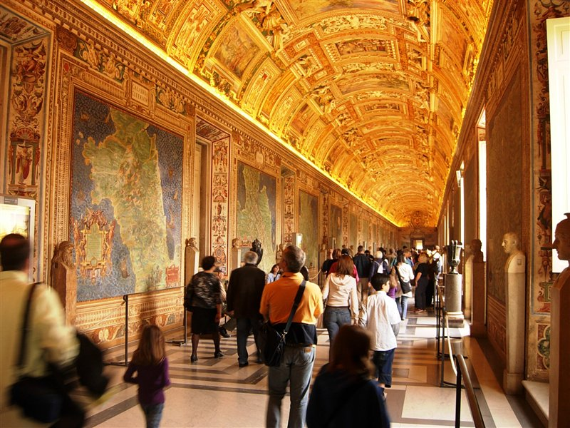 Vatican Museum Pinacoteca